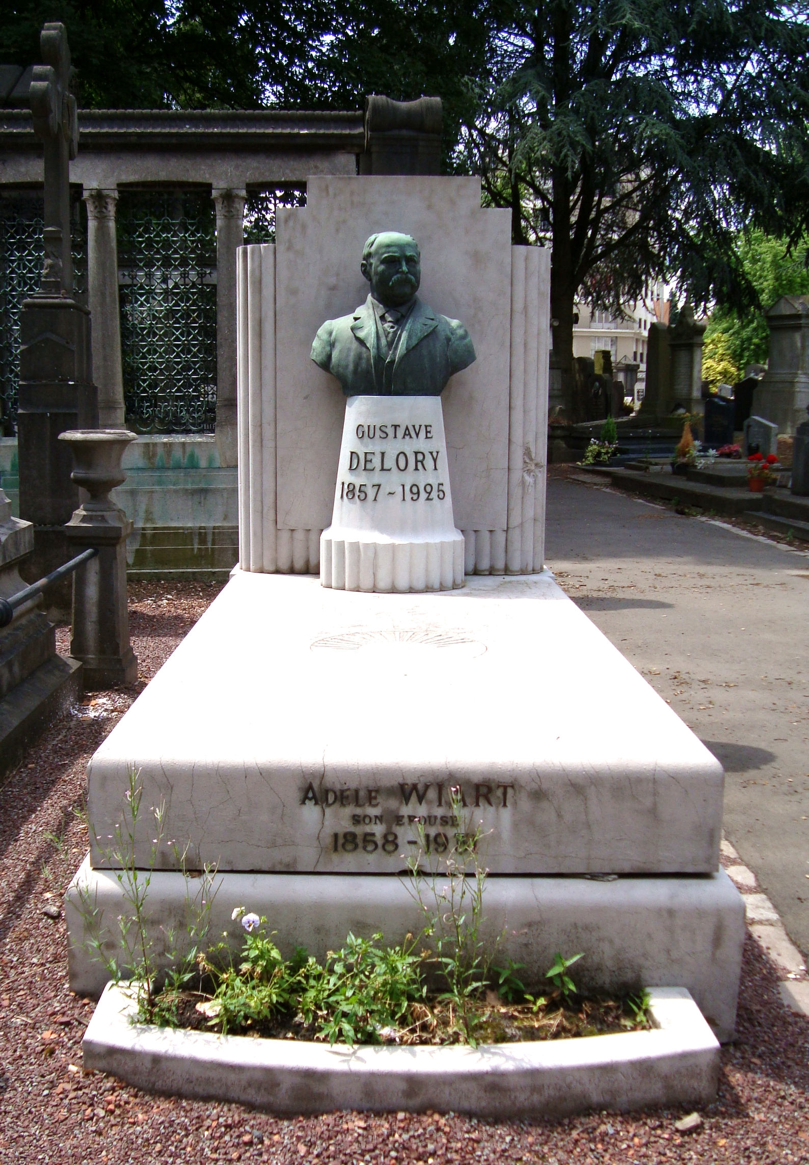 Tombe de Gustave Delory et son épouse dans le cimetière du Sud à Lille (Nord).